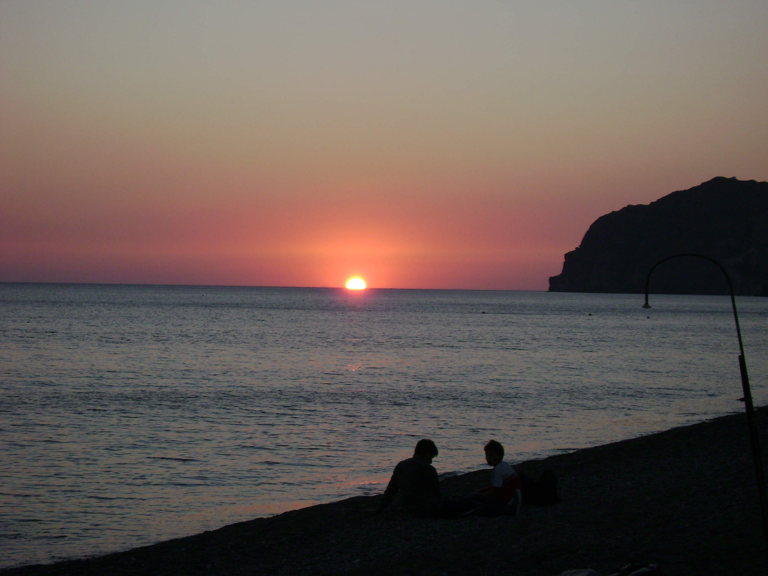 Skala Eresos sunset